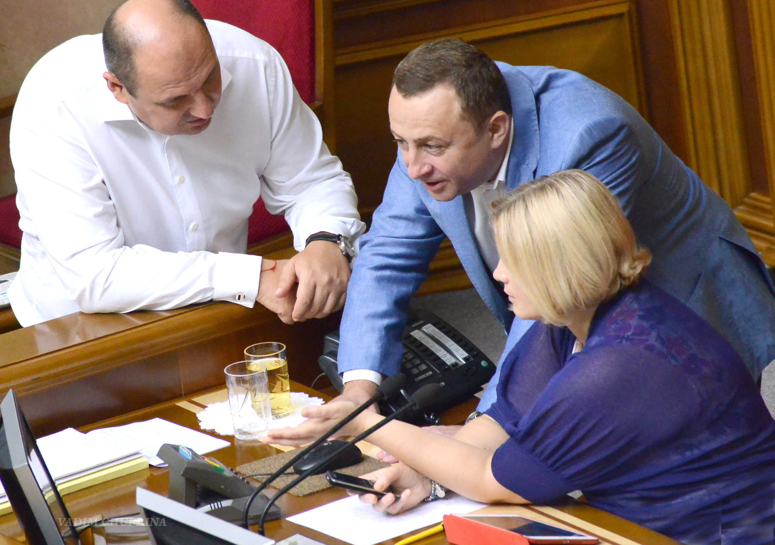 ВЕРХОВНА РАДА УКРАЇНИ 2016, фотограф Вадим Чуприна